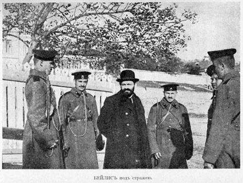 Арестованный Бейлис Arrested Beilis